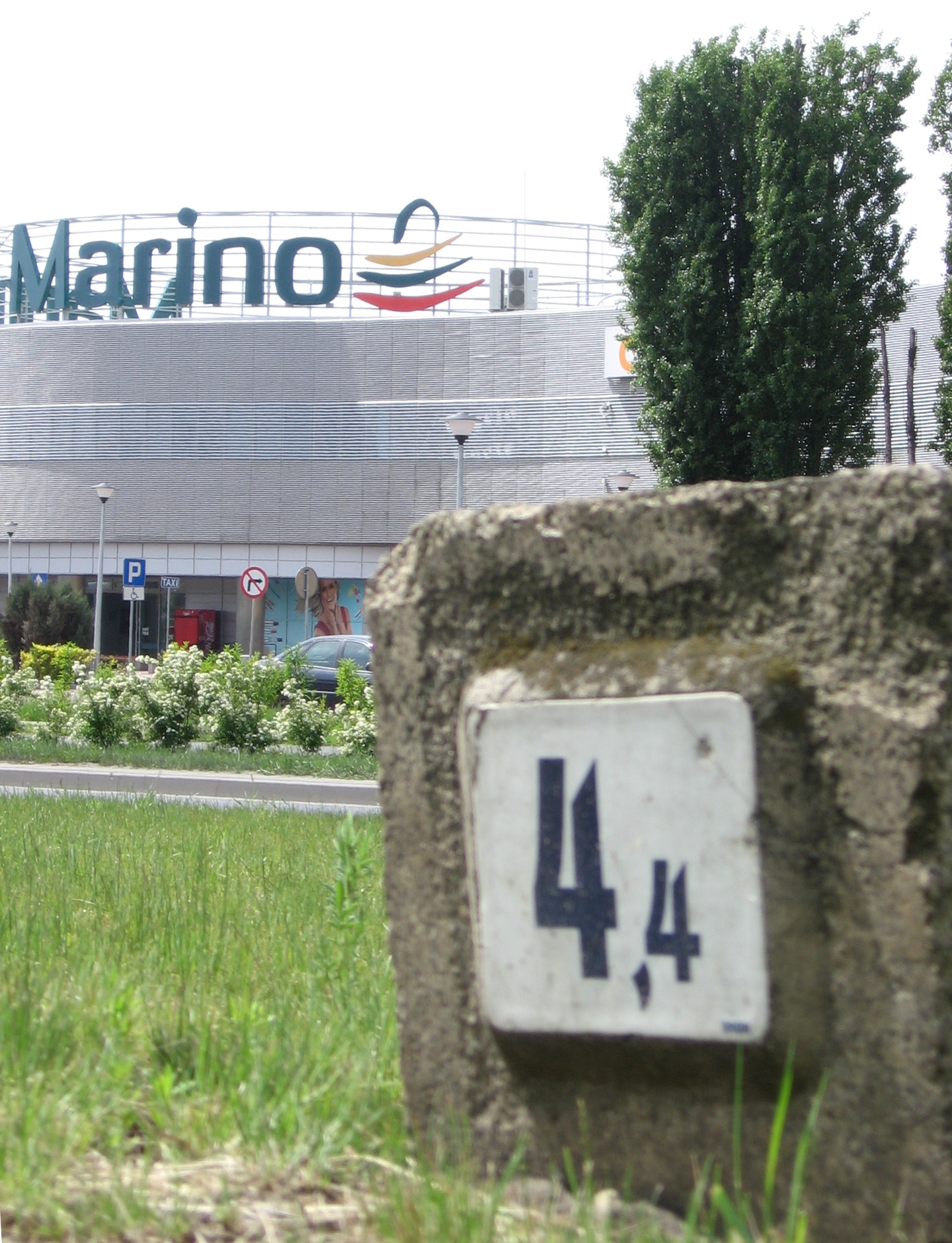 Ulica Żmigrodzka we Wrocławiu - zachowany na pasie między jezdniami słupek kursującej tędy dawniej kolejki wąskotorowej: 4,4 km od Miejskiego Dworca Wąskotorowego przy pl. Staszica.